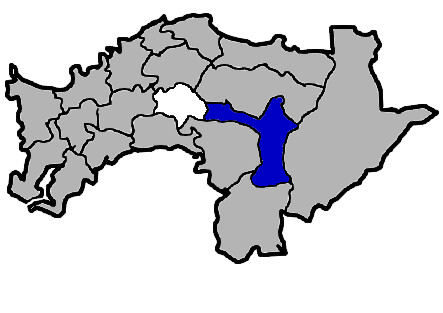 KaurJmeb為編輯中華民國臺灣省嘉義縣番路鄉，於2005年2月10日所繪。